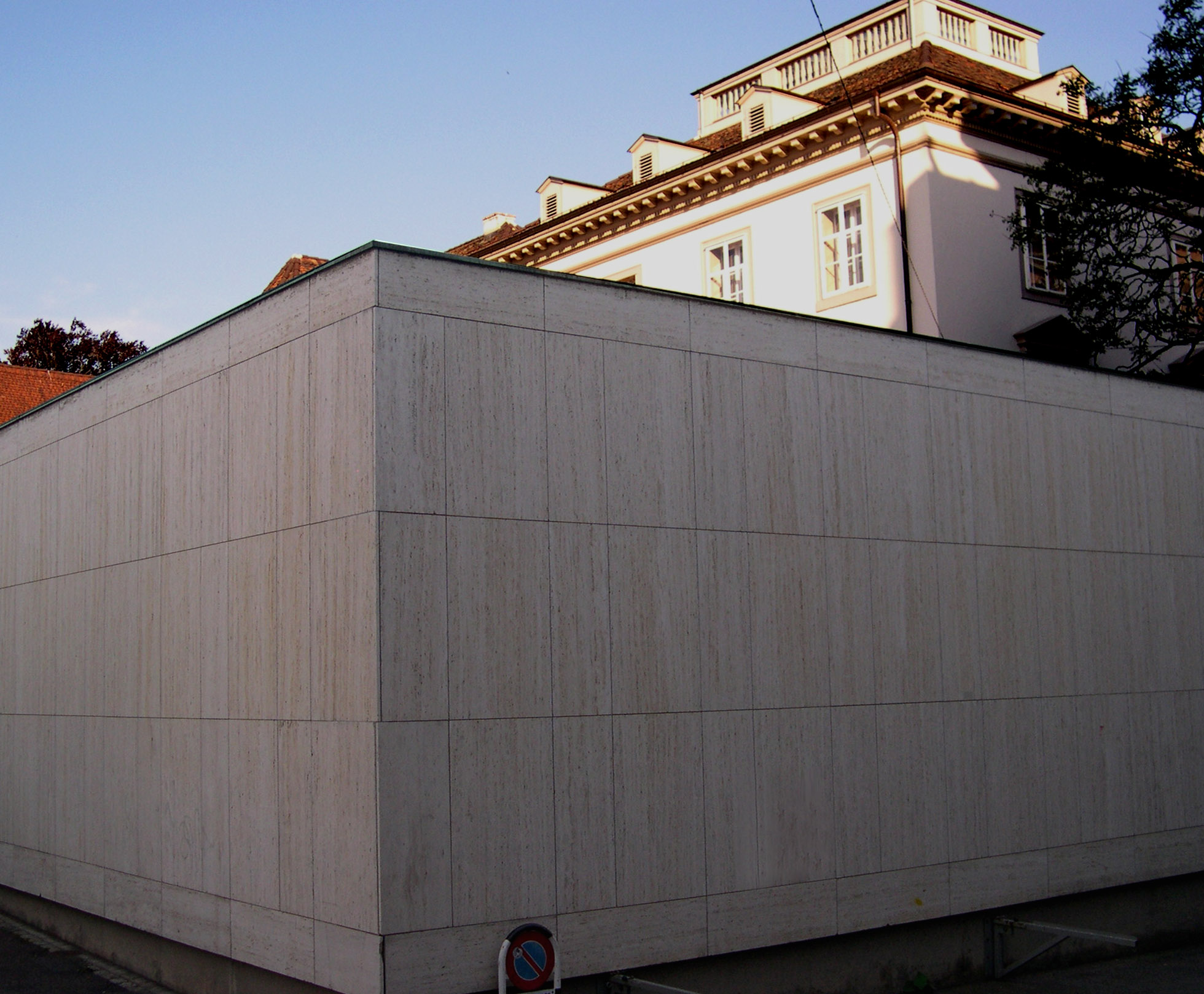 Antikenmuseum Basel und Sammlung Ludwig. Ansicht Rückseite mit Anbau Oberlichtsaal Erdgeschoss von 1966.